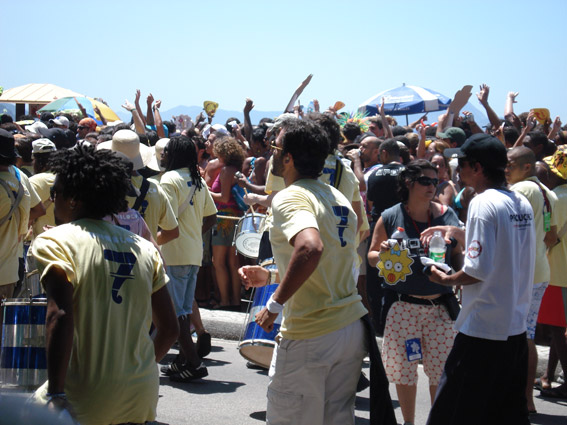 Rio de Janeiro street carnival - 2007 - Monobloco